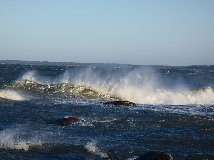 Jõututorm Lohusalu rannas